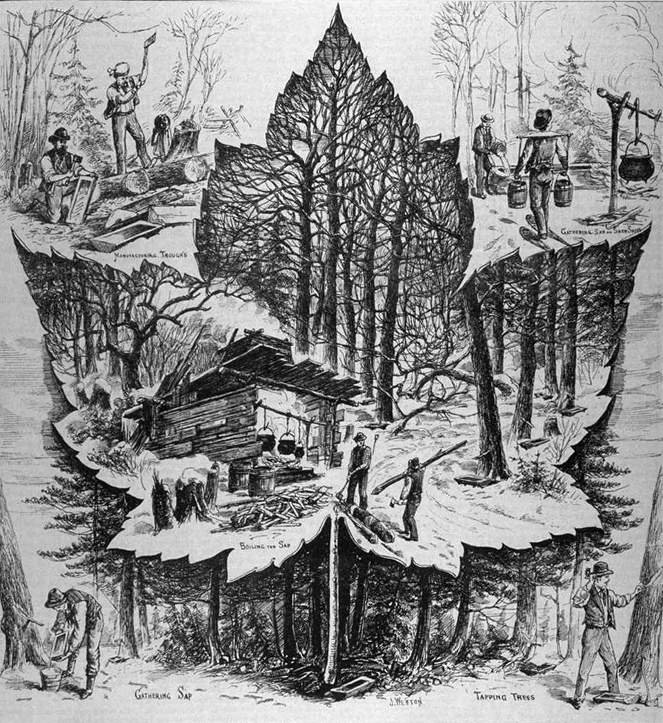 « Scènes de sucrerie » par J. Weston, gravure tirée de L'opinion publique, Vol. 11, no. 17, p. 195 (22 avril 1880)